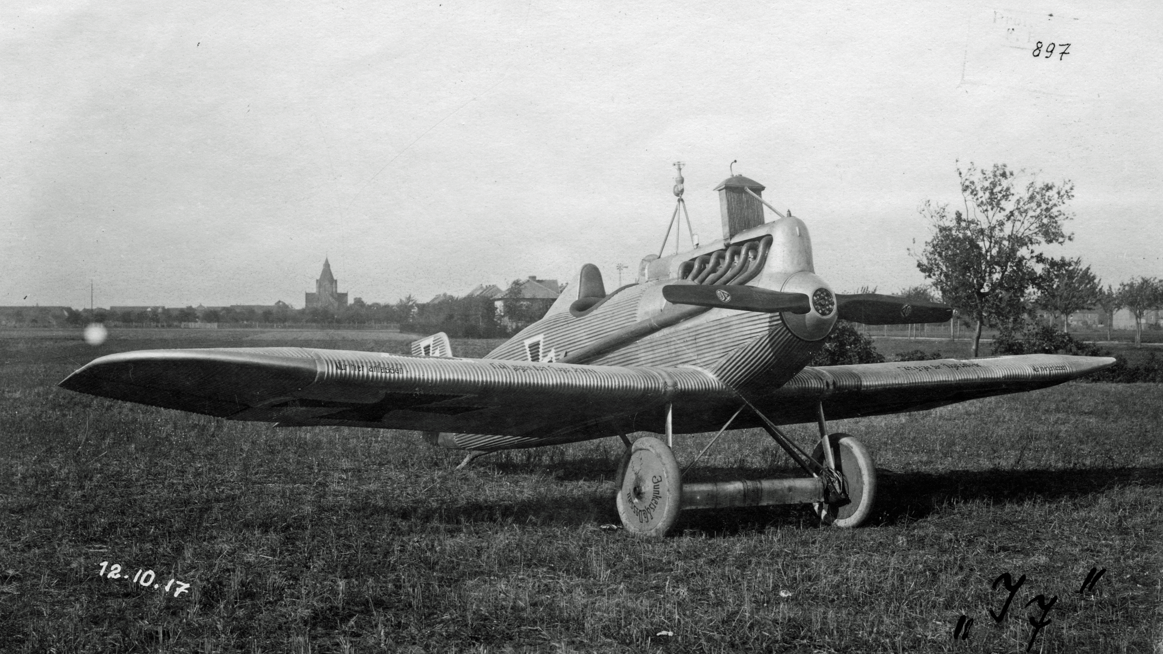 Junkers J 7